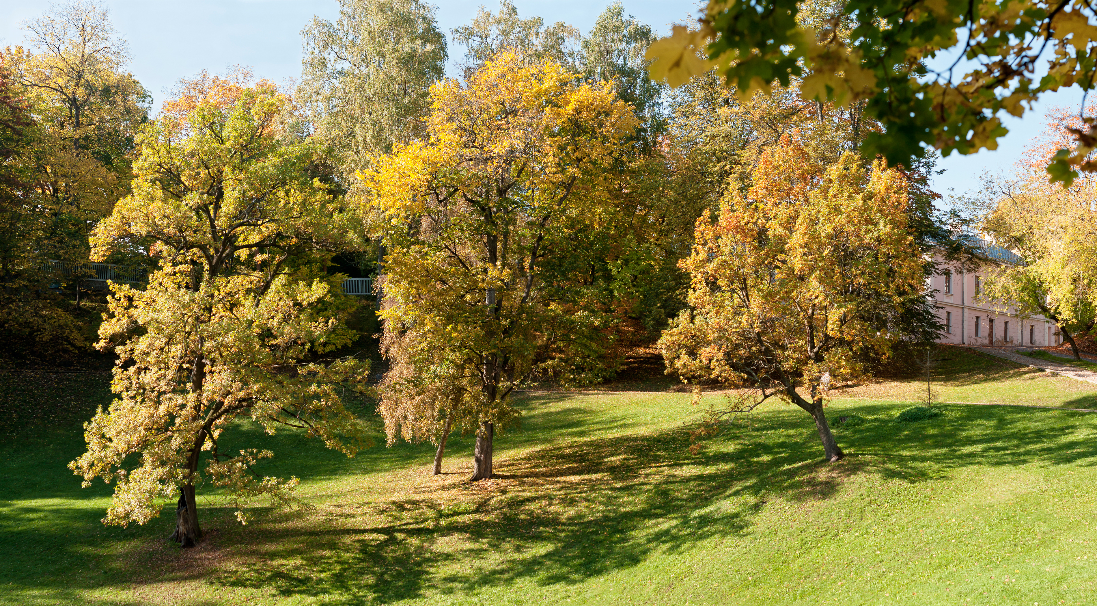 Kassitoome org, sügis 2011. Panoraamfoto kolmest kaadrist.